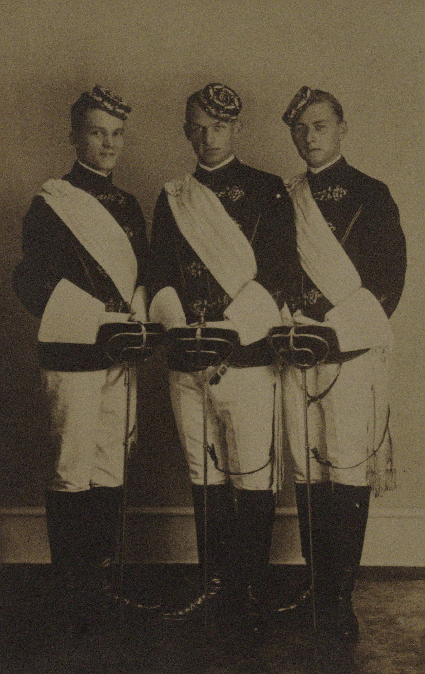 Fotografie der Chargia der Verbindung Leonensia Heidelberg im Vollwichs